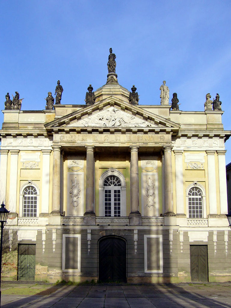 Der Lange Stall in Potsdam, die erhaltene Frontassade.